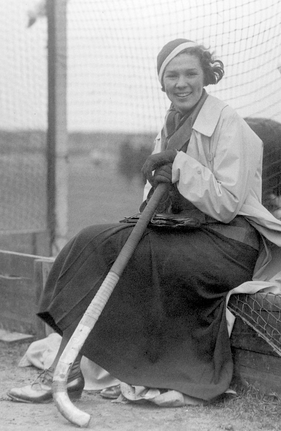 Lien Gisolf , hier na haar carriere. Ze haalde zilver op de Olympische spelen 1928 in Amsterdam, op het onderdeel hoogspringen sprong ze 1 meter 56 . Houdster van drie wereldrecords hoogspringen, en vierde bij de Olympische spelen van 1932 in Los Angeles. Hockeyclub Waalsdorp 1933.